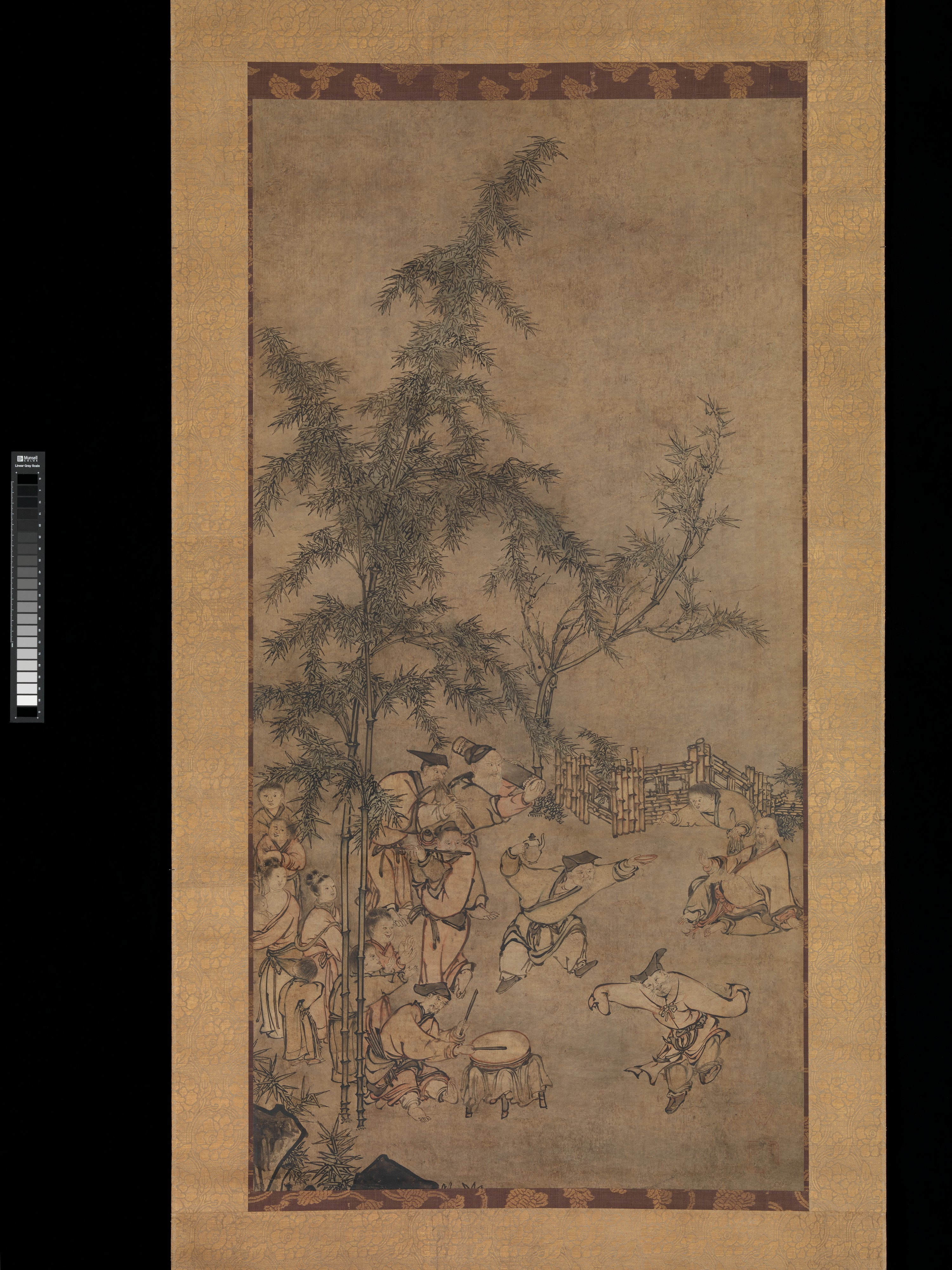 Japan; Hanging scroll; Paintings